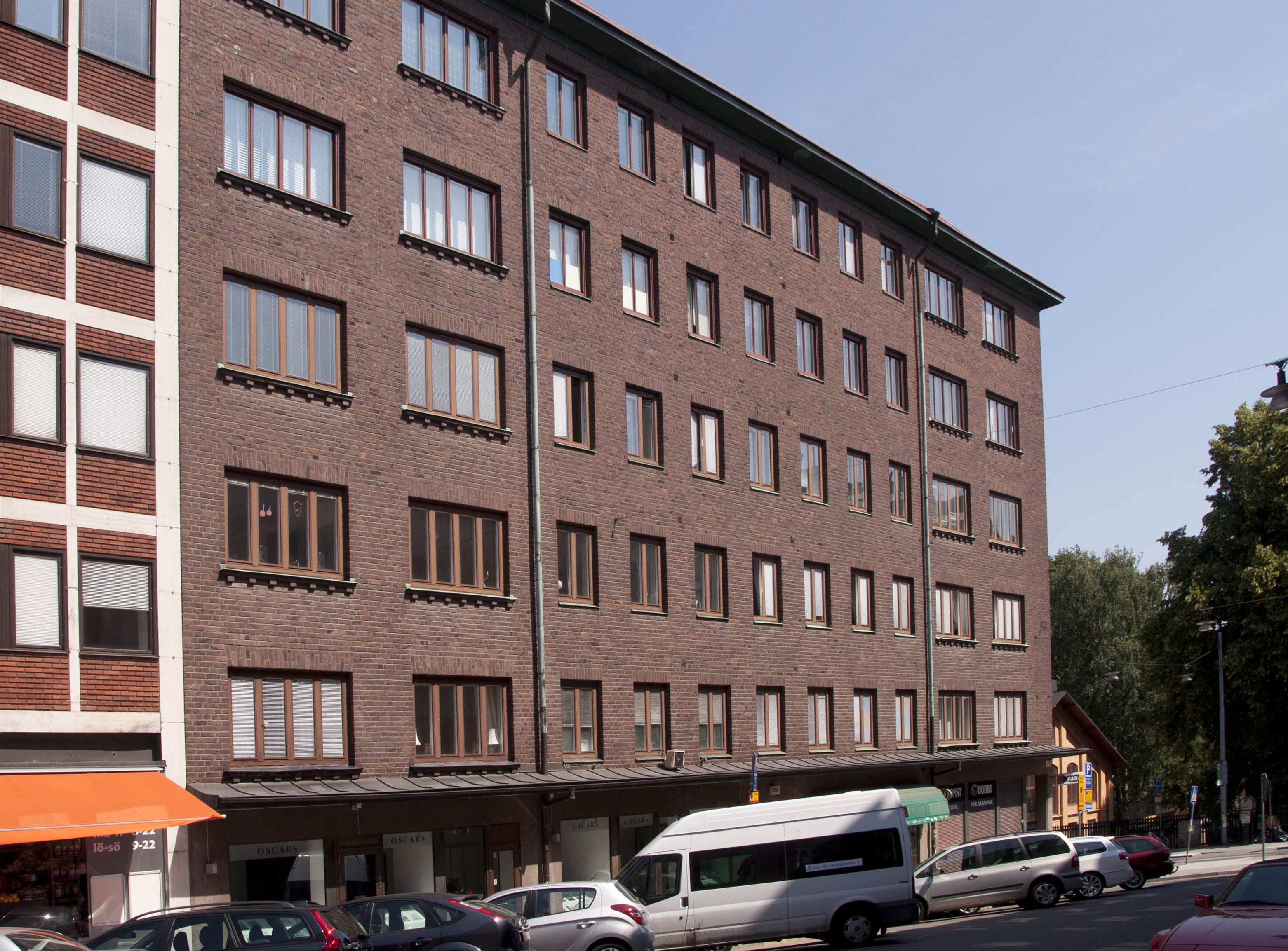 Storgatan 29. Byggt 1935-1936.